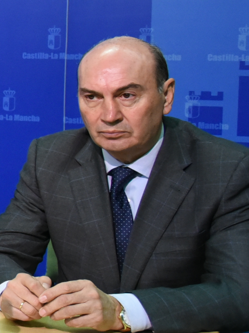 TOLEDO. 30-01-2017. El consejero de Agricultura, Medio Ambiente y Desarrollo Rural, Francisco Martínez Arroyo mantiene una reunión, en la Consejería de Agricultura, con los cinco presidentes de las Diputaciones provinciales de Castilla-La Mancha para tratar asuntos relevantes para los municipios de la región, como caminos o desarrollo rural, entre otros. (Fotos: José Ramón Márquez//JCCM)